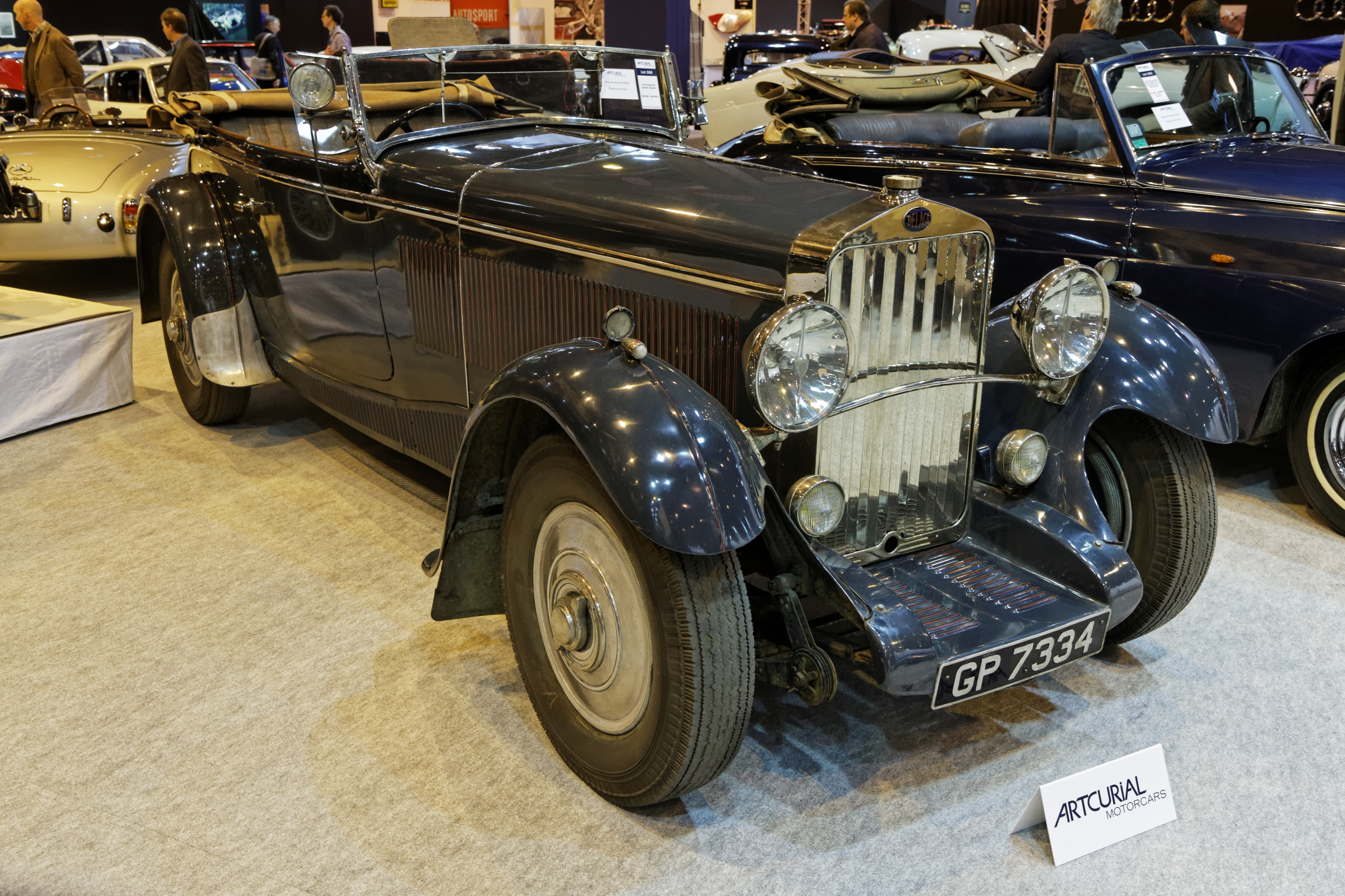 Une Delage D8 Roadster Chapron berline exposée lors du salon Retromobile 2014